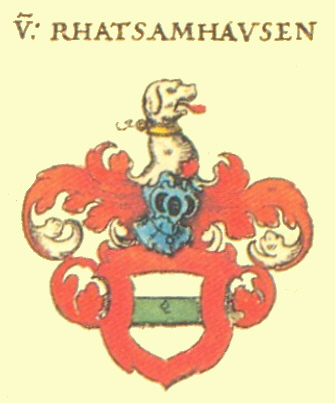 Wappen der Elsässischen Adelsfamilie Rathsamhausen